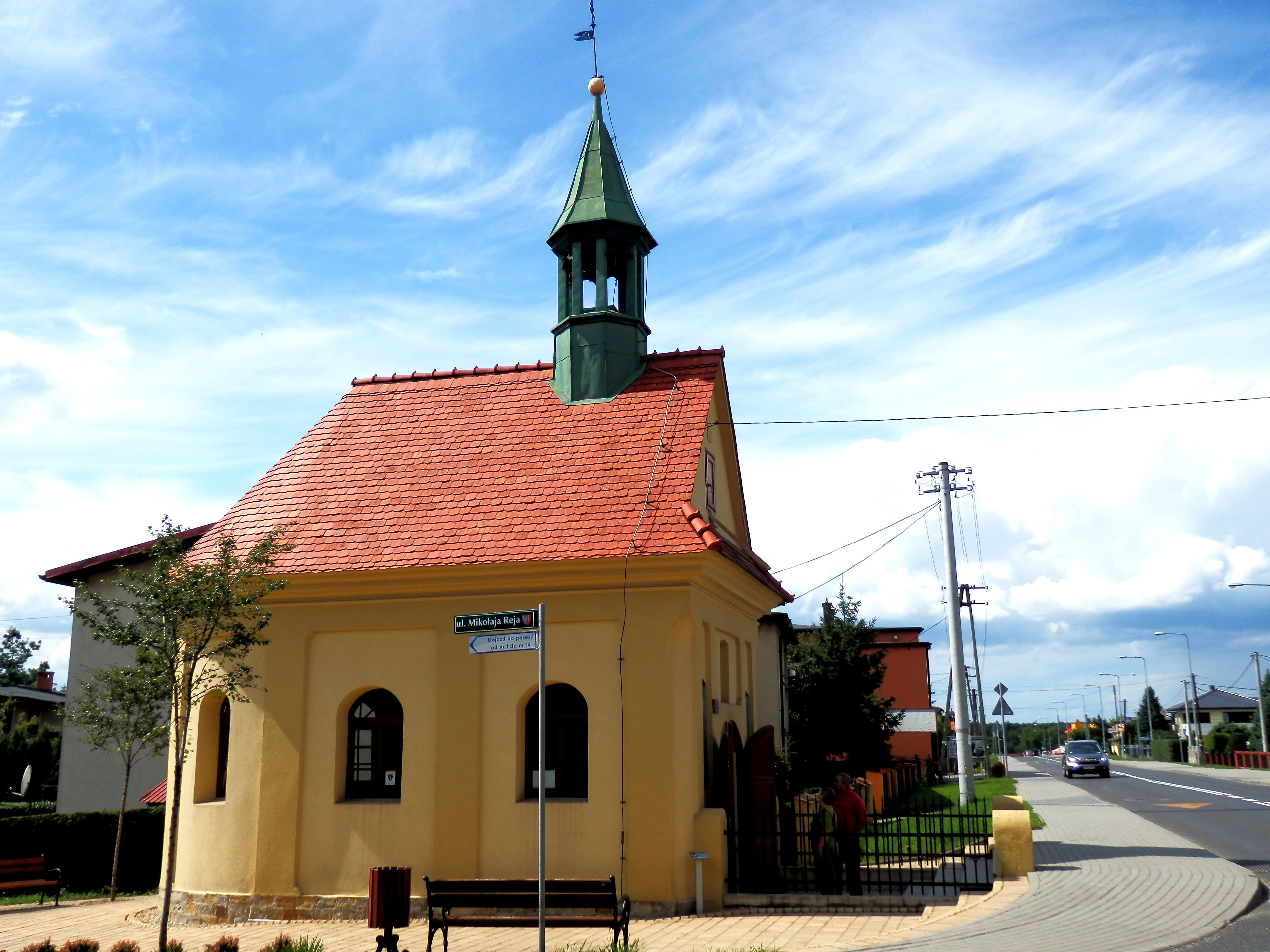 Żory, kaplica, 1864